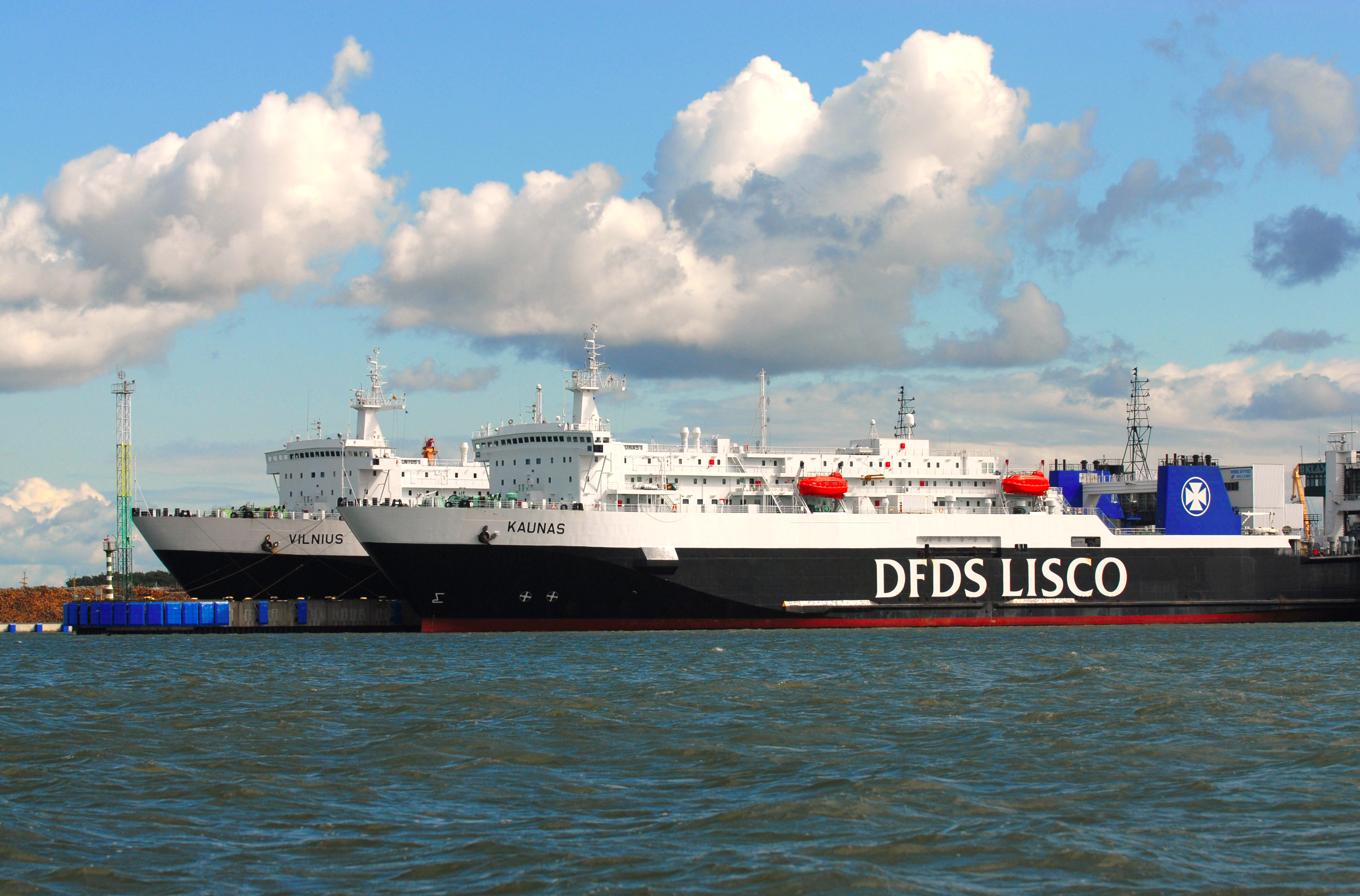 Trailery Vilnius a Kaunas fy DFDS LISCO (dnes KLASCO) v přístavu